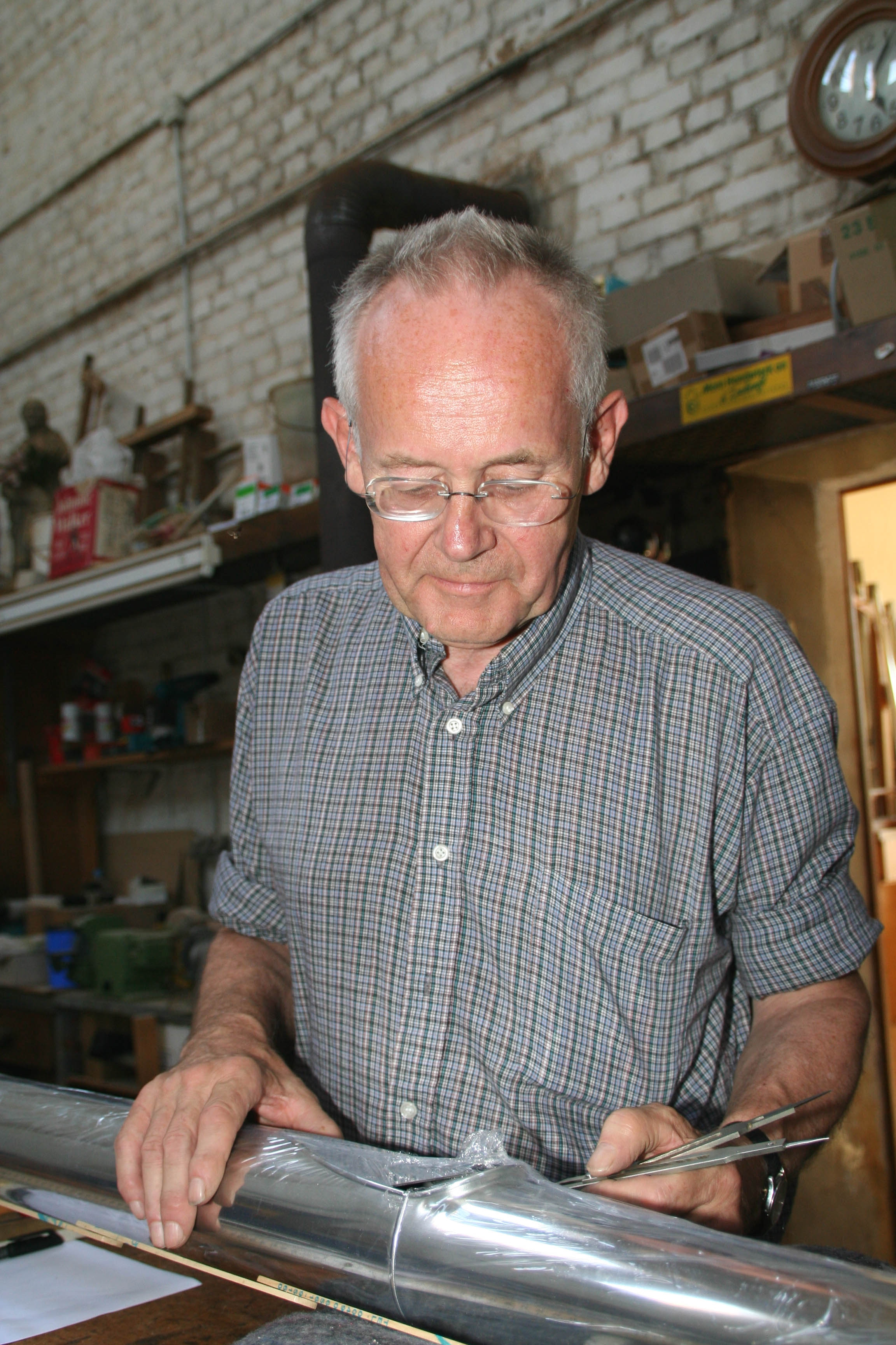 De Georg Westenfelder am Juli 2006.